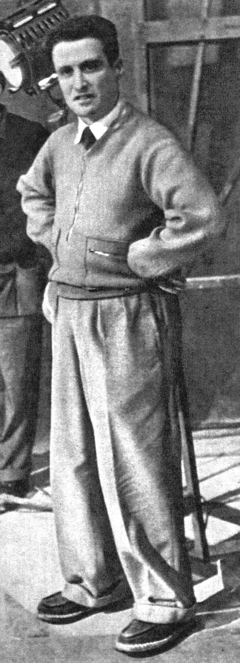 Enrico Fulchignoni sul set del film "I due Foscari" (1942)